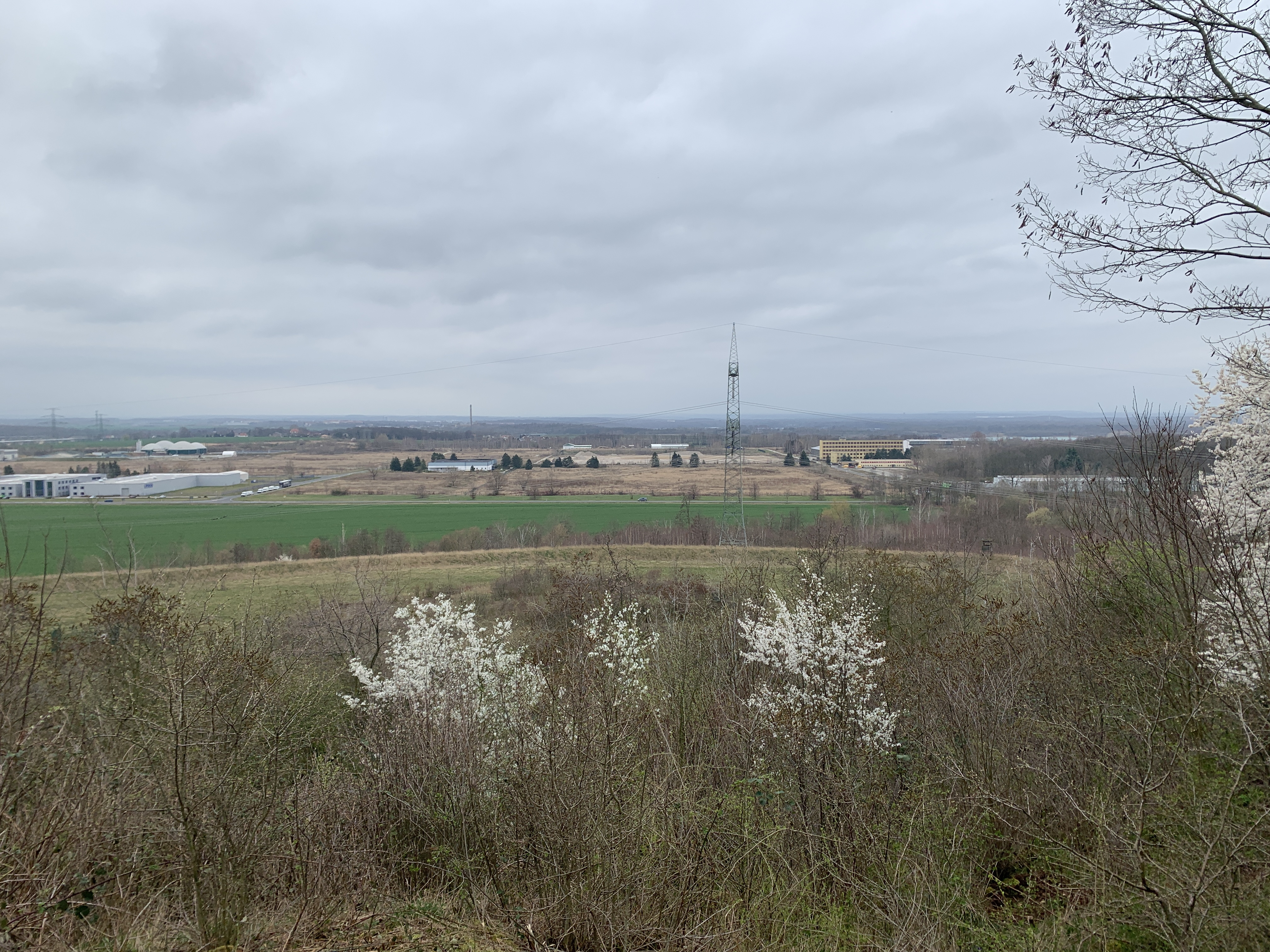 Halde Trages, Blick auf den Standort des ehemaligen Kraftwerk Thierbach